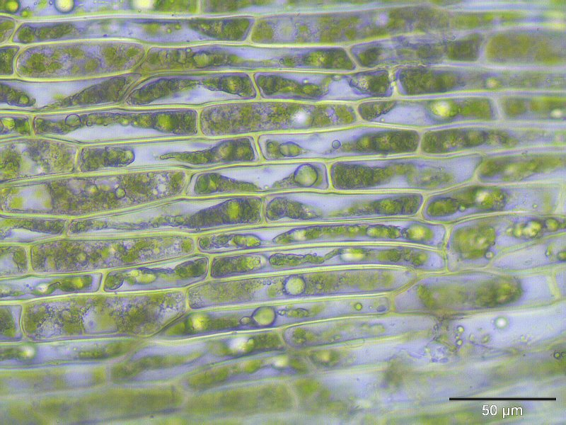 Vielblütiges Goldschlafmoos (Campylium polygamum), Laminazellen, ~400x